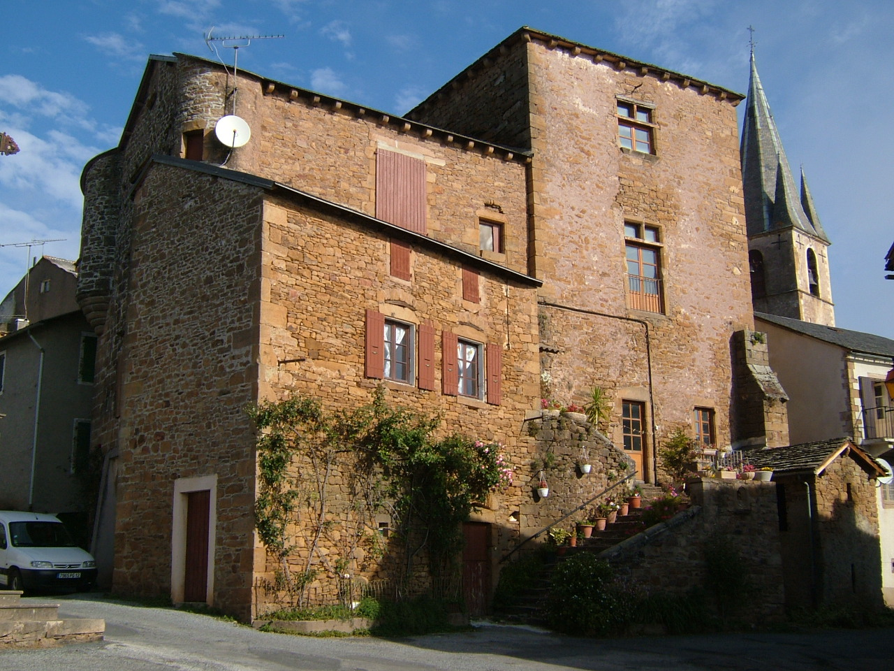 Pousthomy, Aveyron (France). Maisons et clocher.